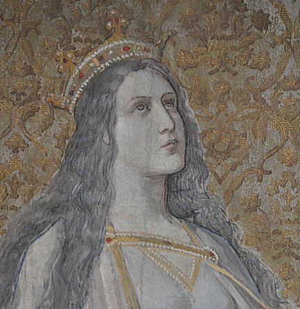 Sophie von Böhmen